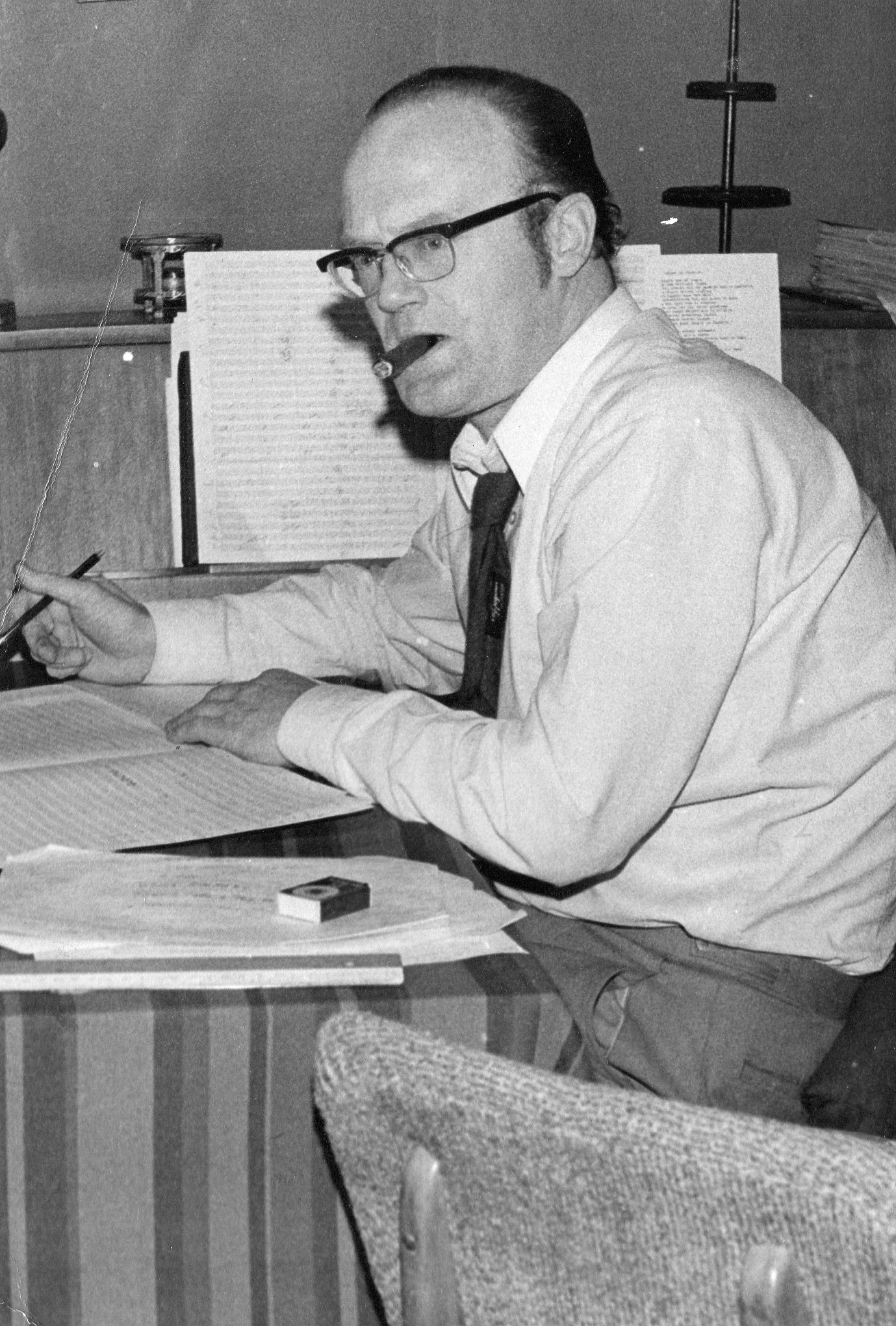 Jaap Hofland, arrangeur van lichte muziek.